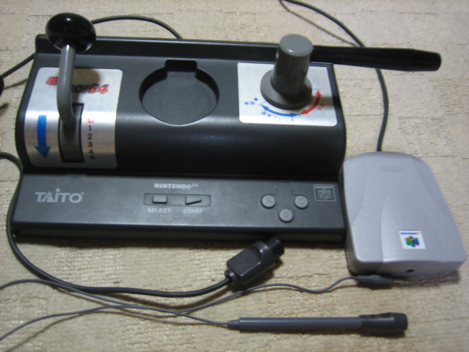 denGO64_controller&NUS-020